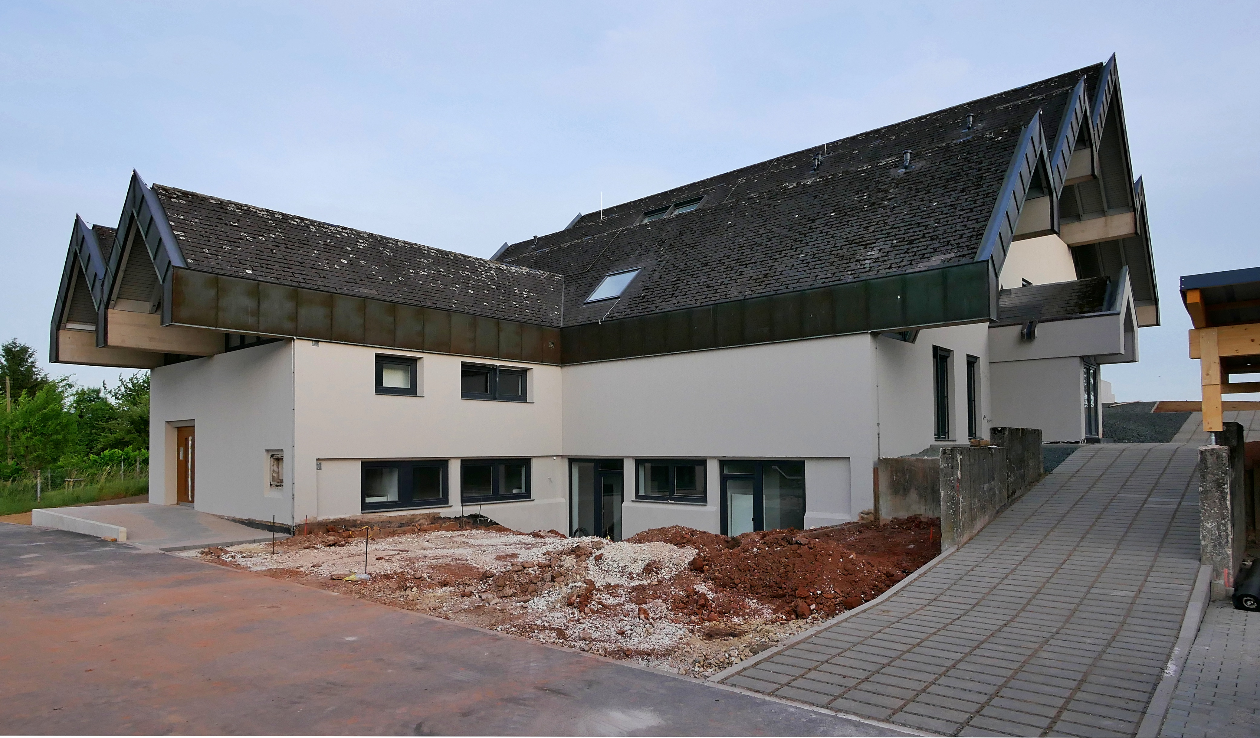 Ehemalige Kirche Mariae-Himmelfahrt Trier-Quint beim Umbau in ein Wohnanlage.